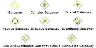 Brány BPMN 2.0